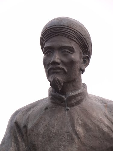 Tượng đài hư cấu về dung nhan quan đại thần Nguyễn Du.